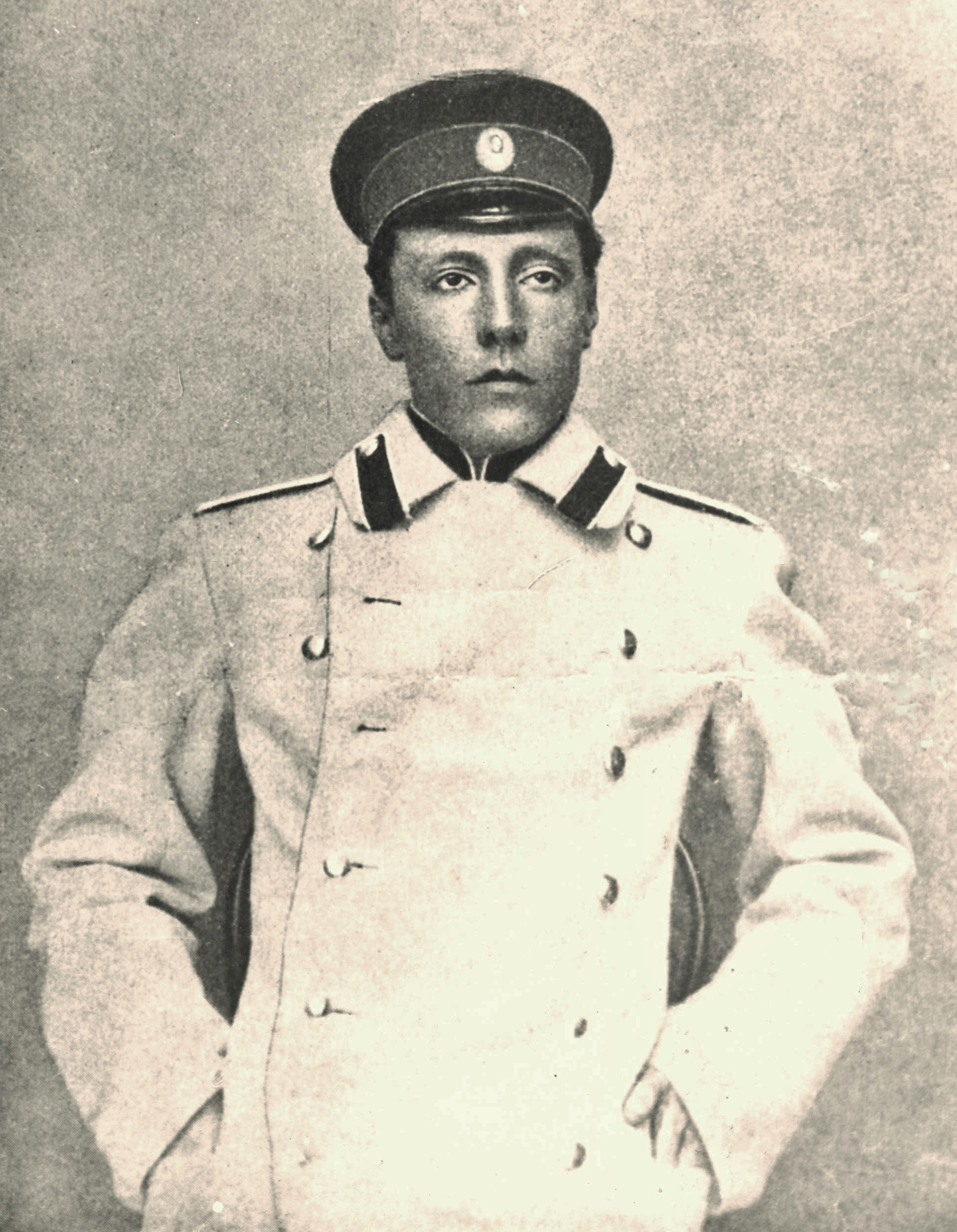 Stepan Valerianovič Balmašëv